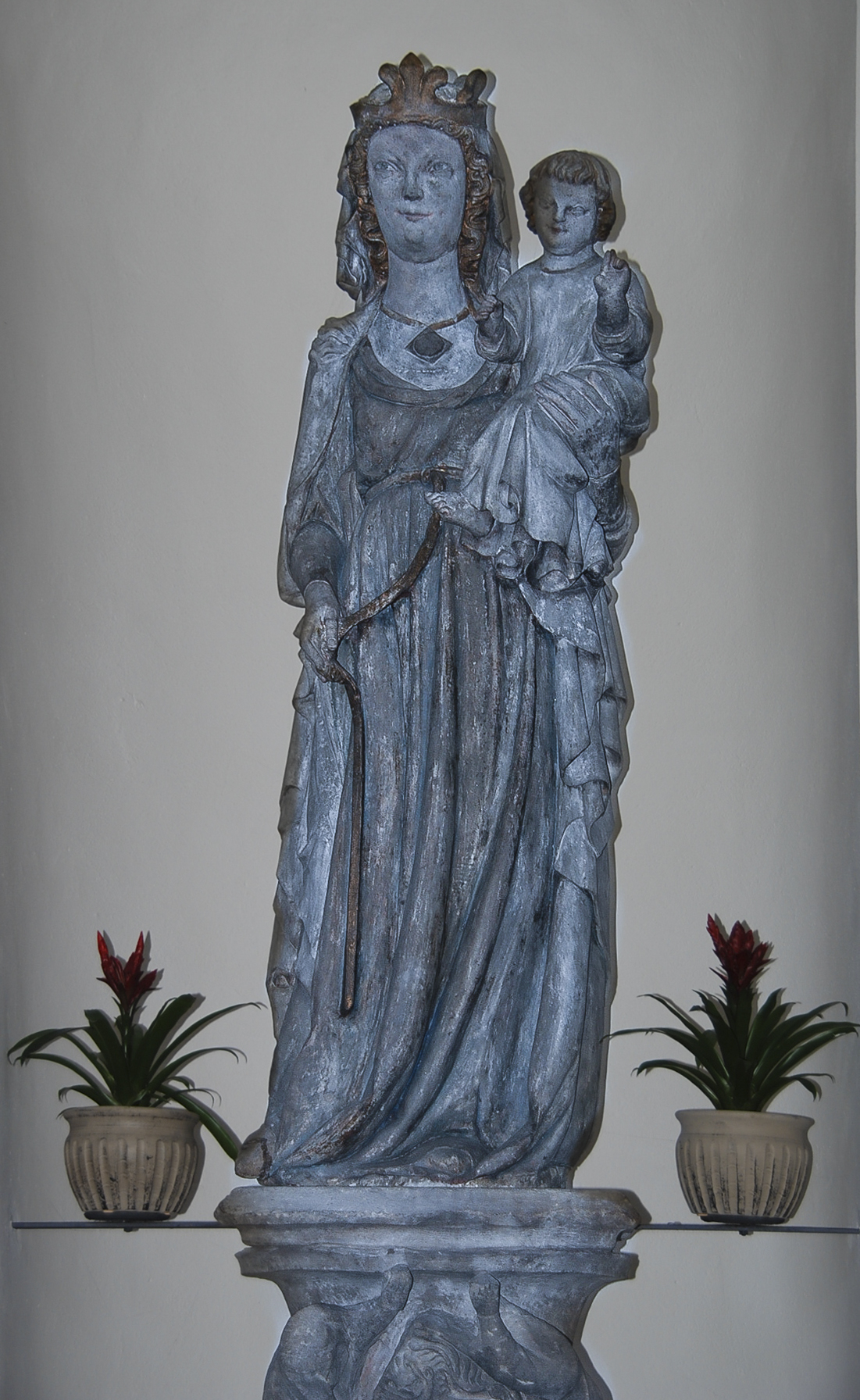 Bei der sogenannten Lauber Madonna (manchmal auch: Madonna von Laub) handelt es sich um eine gut lebensgroße Sandstein-Vollplastik. Sie wird nach ihrem Standort in der katholischen Filialkirche St. Nikolaus in der Ortschaft Laub (Prichsenstadt) benannt und gilt als bedeutendes Beispiel spätgotischer Steinplastik. Die Statue entstand im frühen 14. Jahrhundert (um 1310) in einer Würzburger Werkstatt. Im Jahr 1590 kam sie für den Preis von „2 Aimer Wein“[1] aus der Würzburger Franziskanerkirche nach Laub.